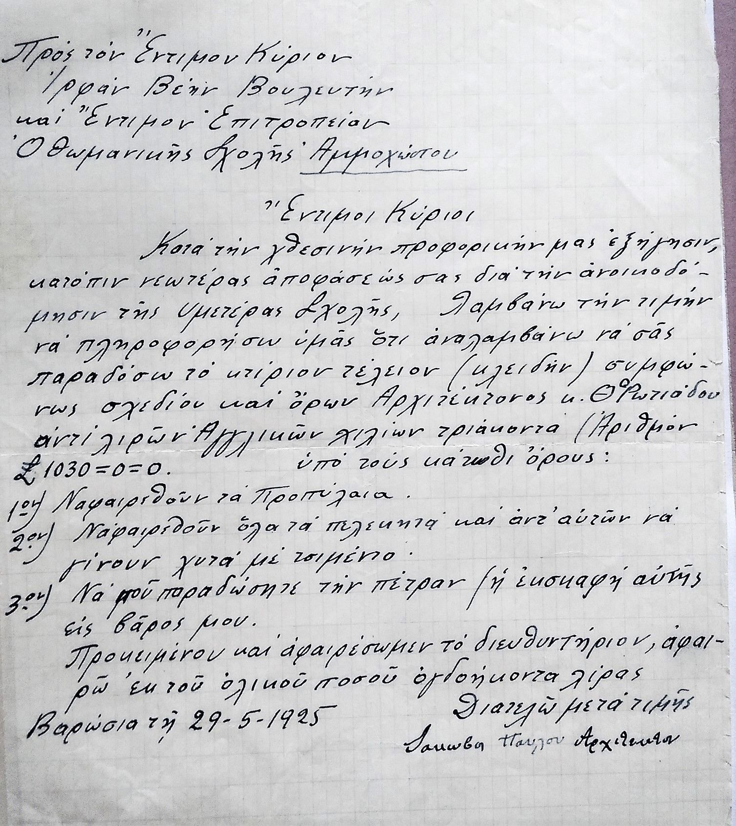 Epistoli yiakoumi